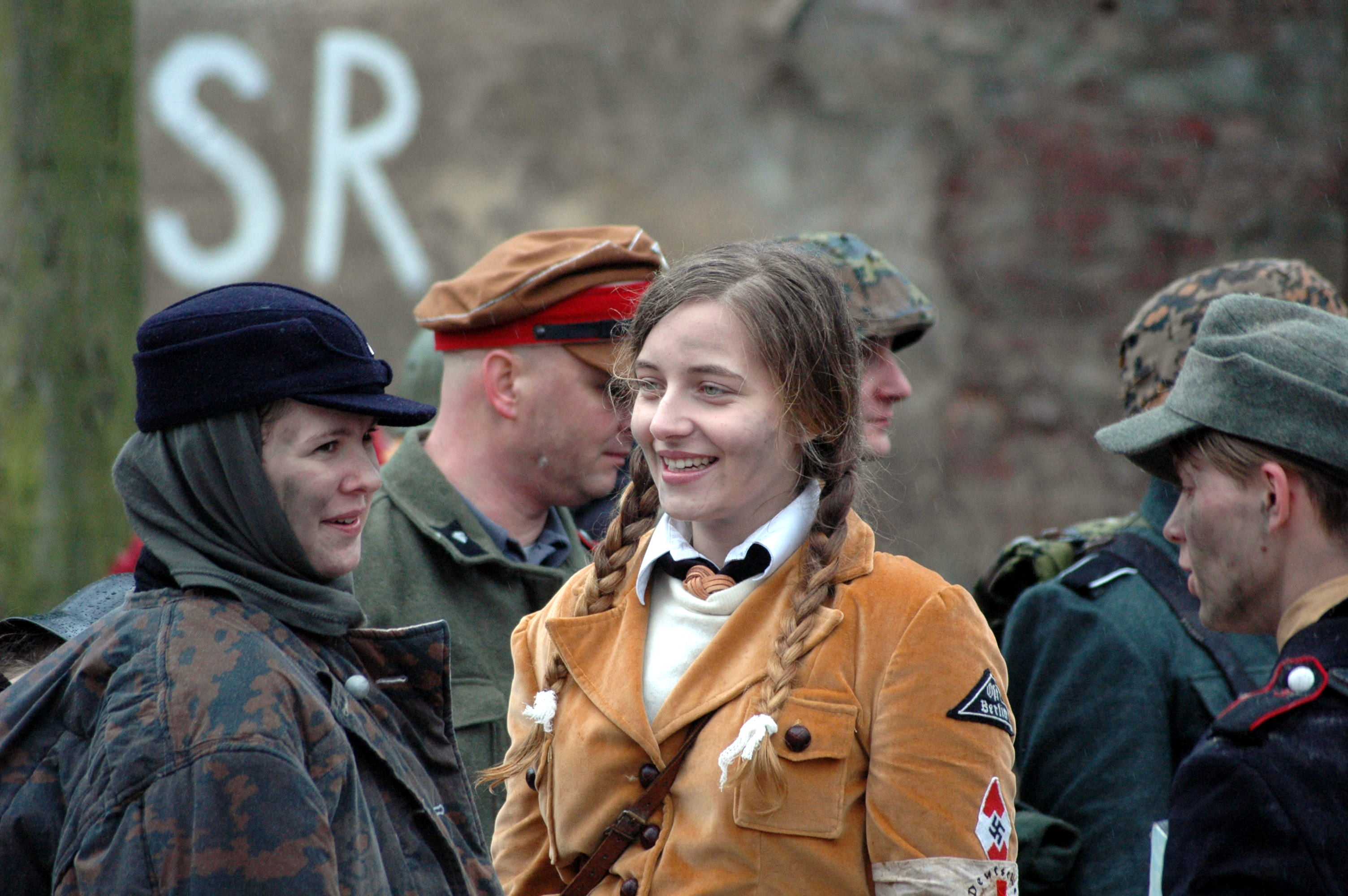 Bój o Kołobrzeg